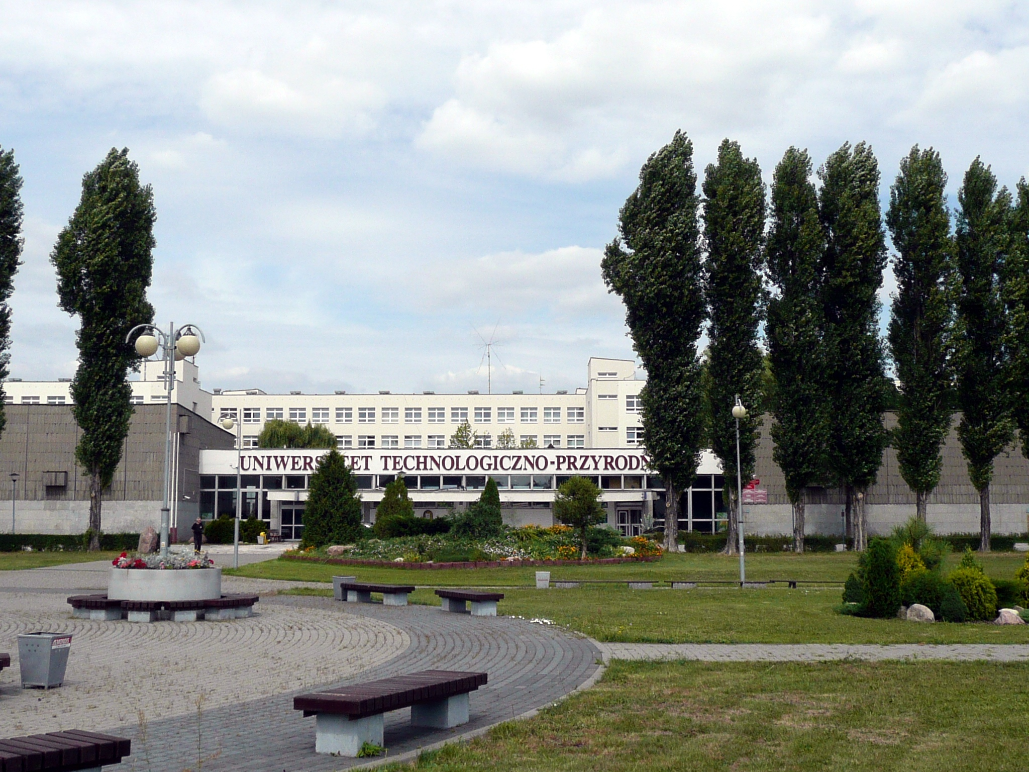 Uniwersytet Technologiczno-Przyrodniczy im. Jana i Jędrzeja Śniadeckich w Bydgoszczy, budynek główny przy ul. Kaliskiego w Bydgoszczy